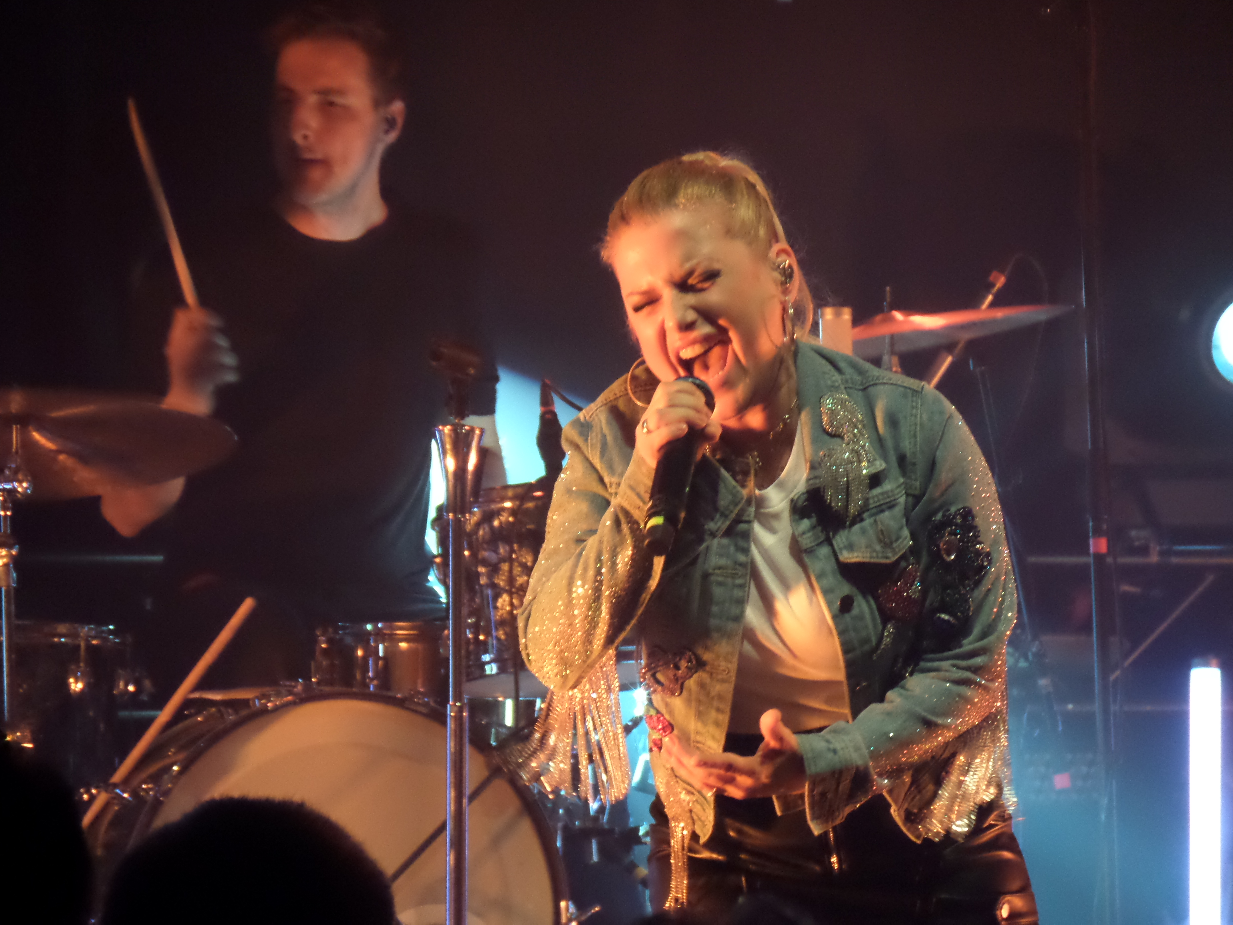 Jeanette Biedermann während ihrer DNA-Tour (2020)